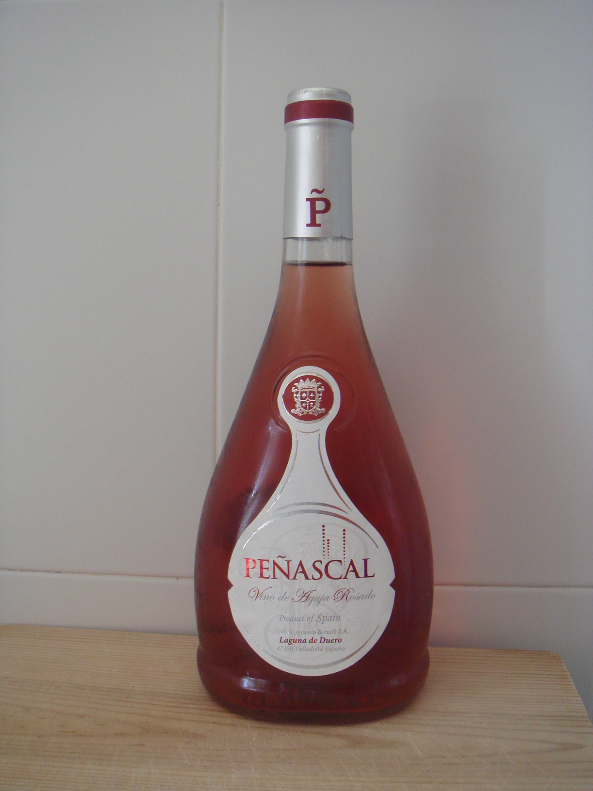 Vino rosado de aguja, provincia de Valladolid, España.